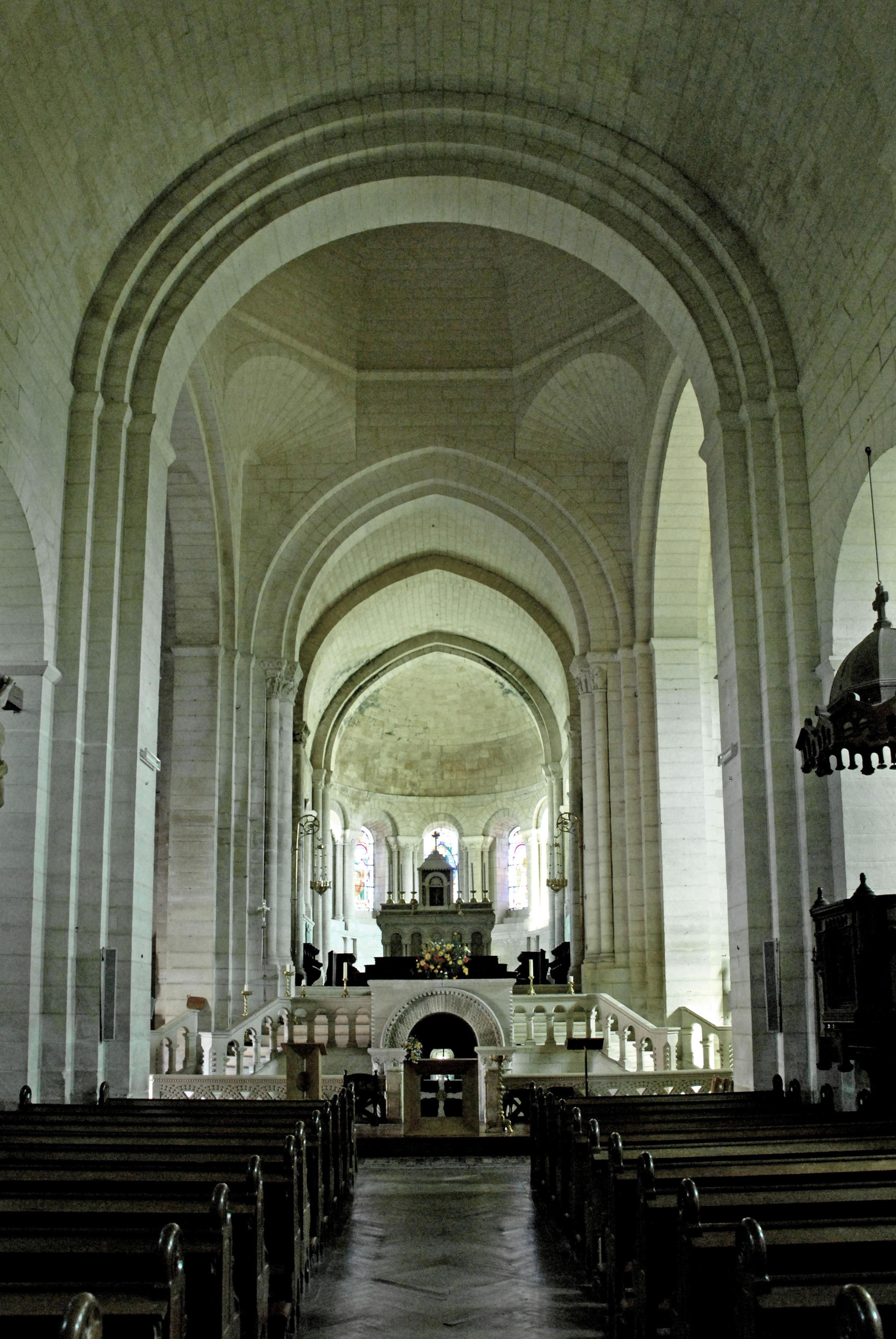 Vouvant, roman. Kirche, Mittelschiff zum Chor